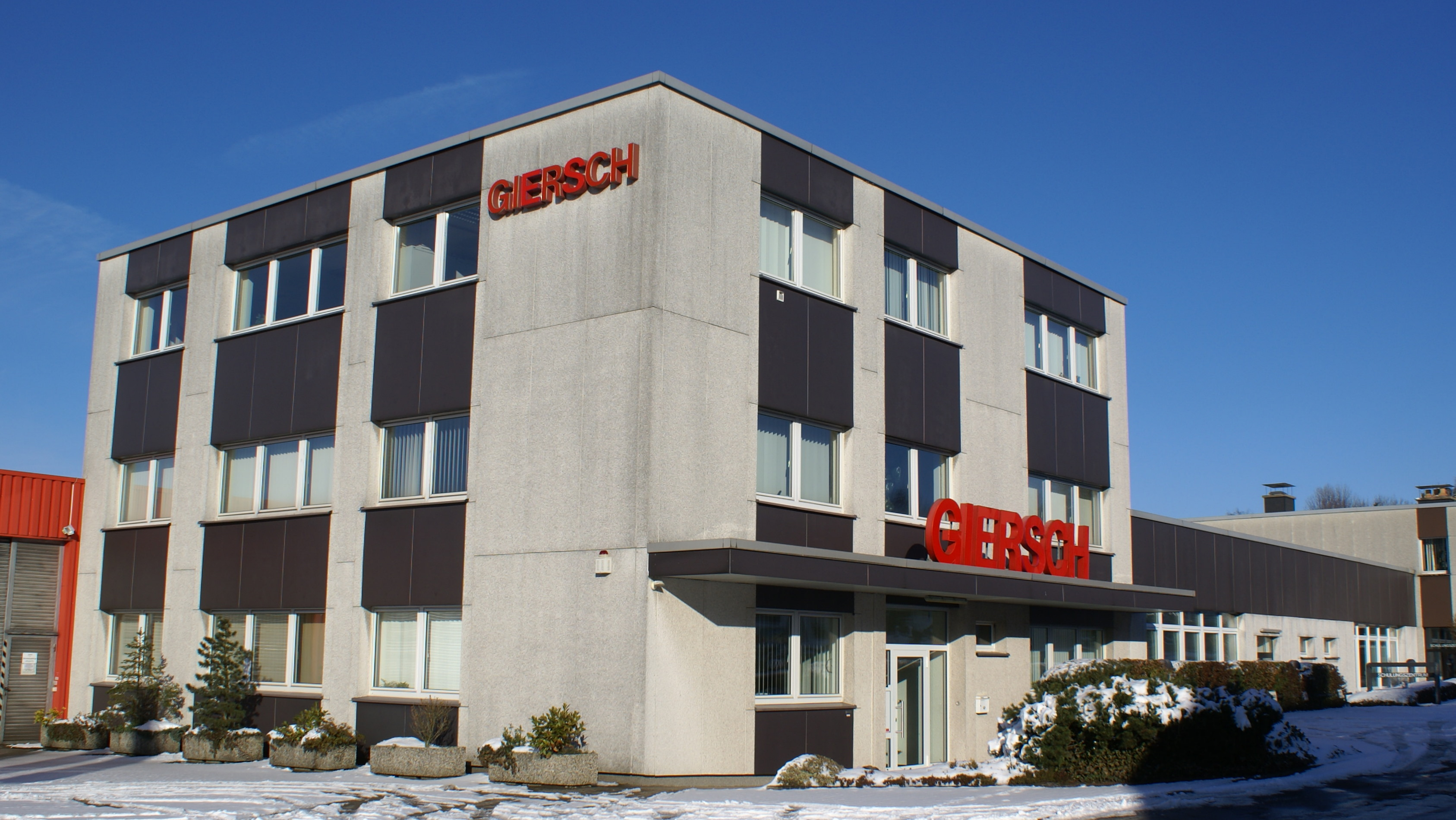 Firmengebäude Giersch Hemer-Deilinghofen